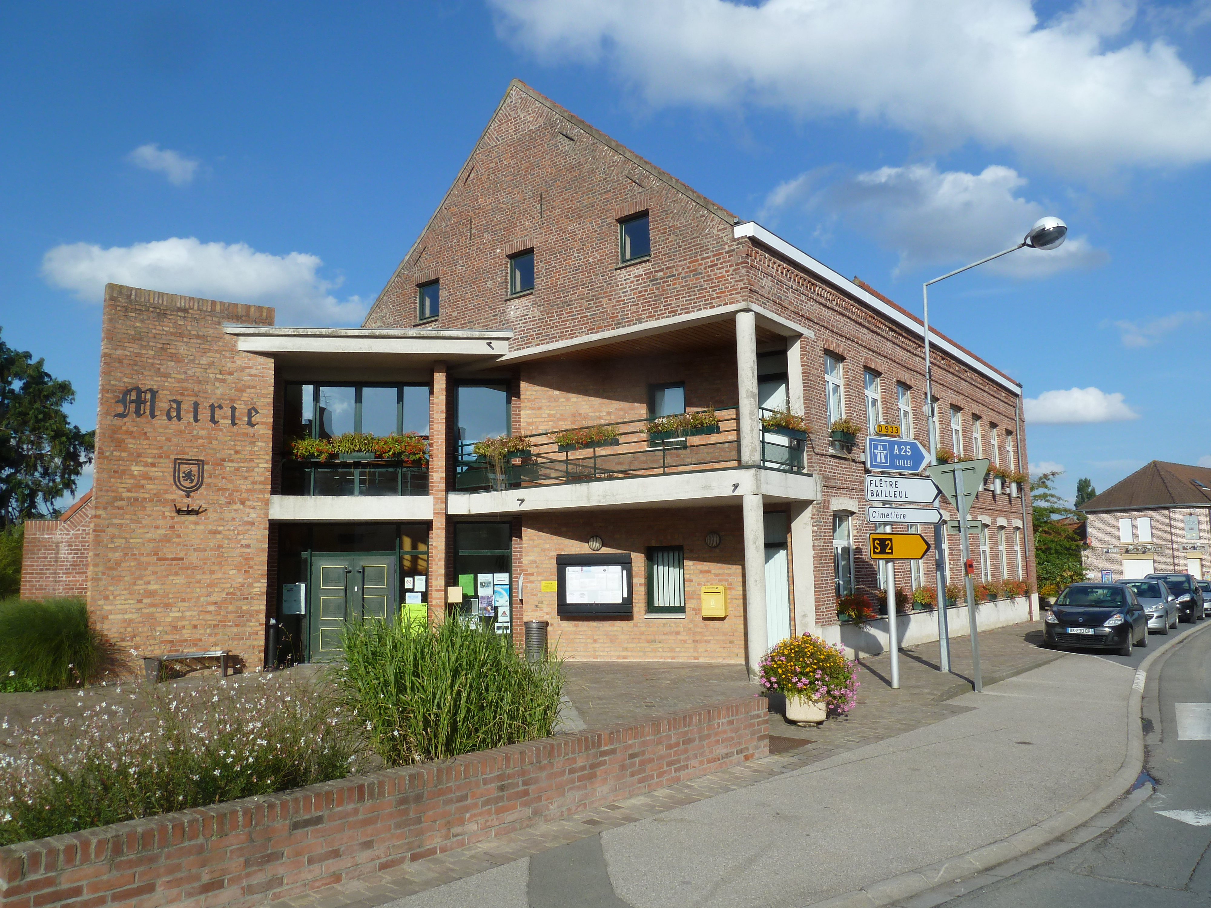 La mairie de Caëstre, Nord, France